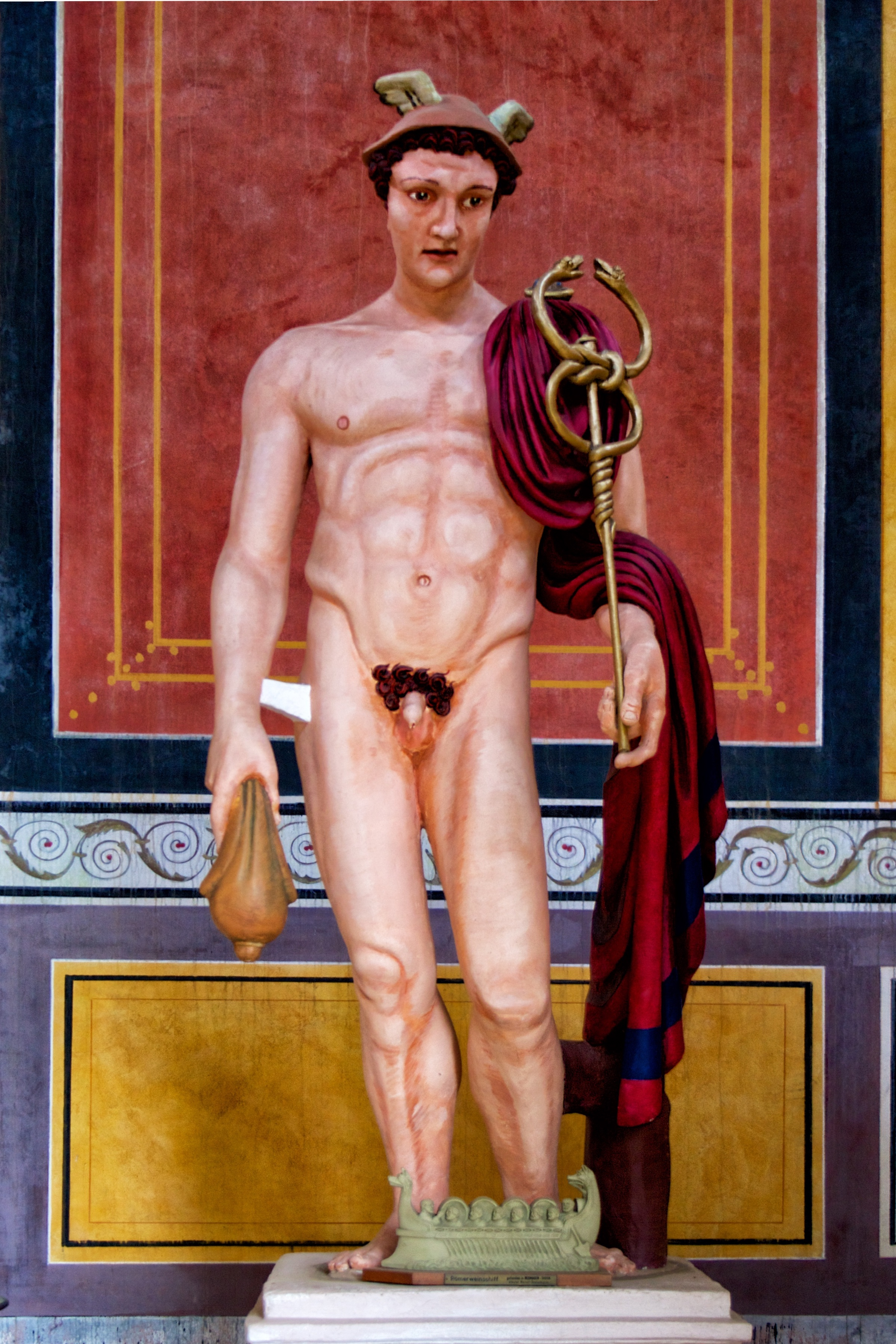 Mercurius-Figur im römischen Tempelbezirk Tawern.